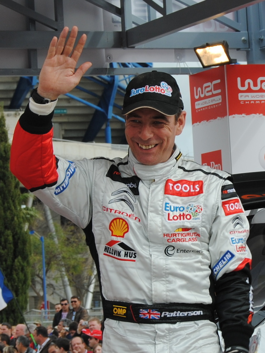 Chris Patterson Rally de Portugal 2011